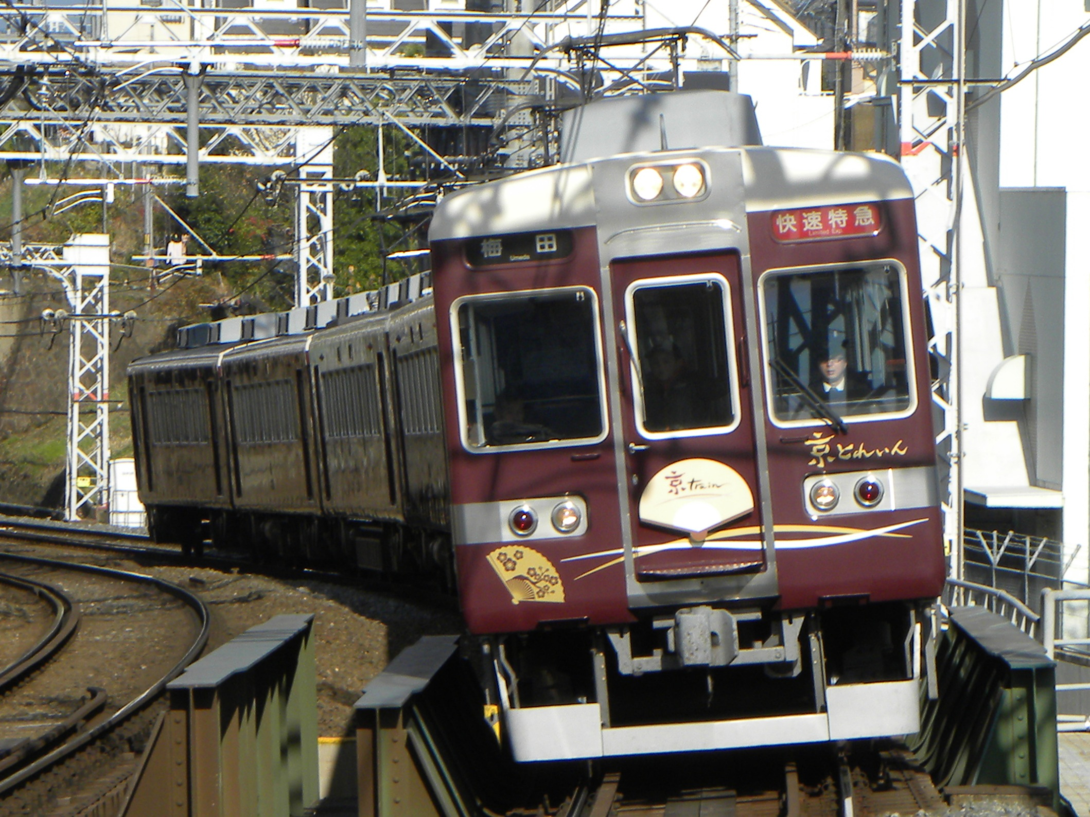 京とれいん